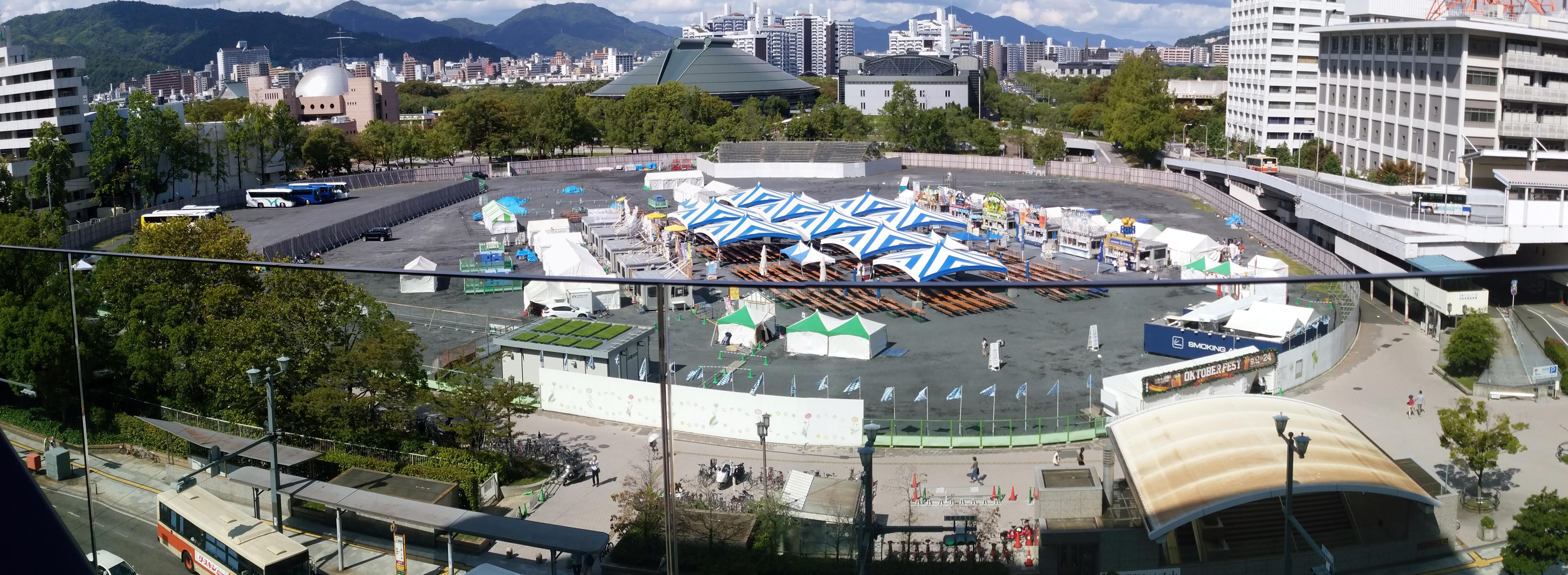 イベント開催中の旧・広島市民球場跡地